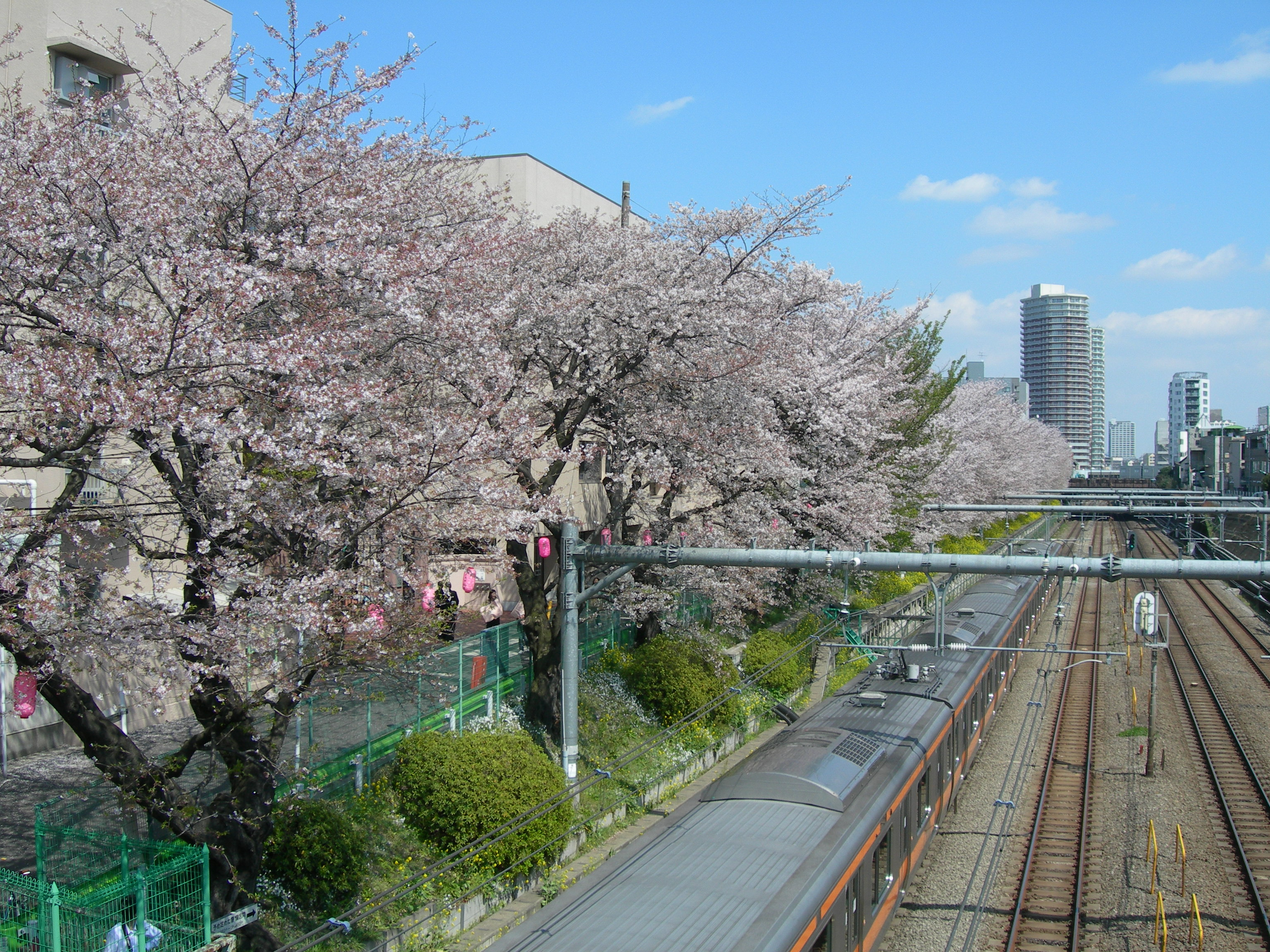 中央線東中野駅西方の桜並木 「中央線と桜」